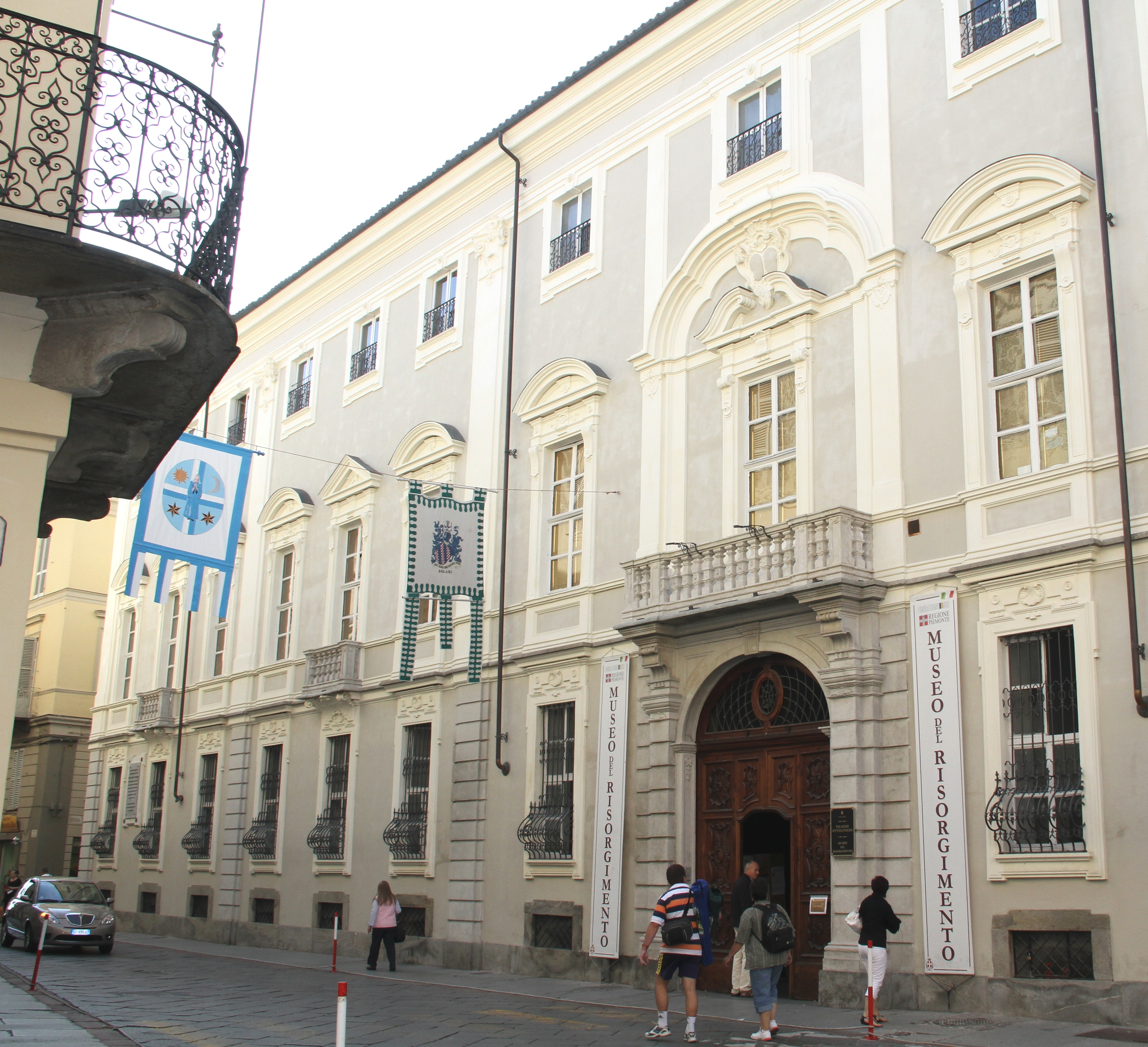 Palazzo Ottolenghi This is a photo of a monument which is part of cultural heritage of Italy.